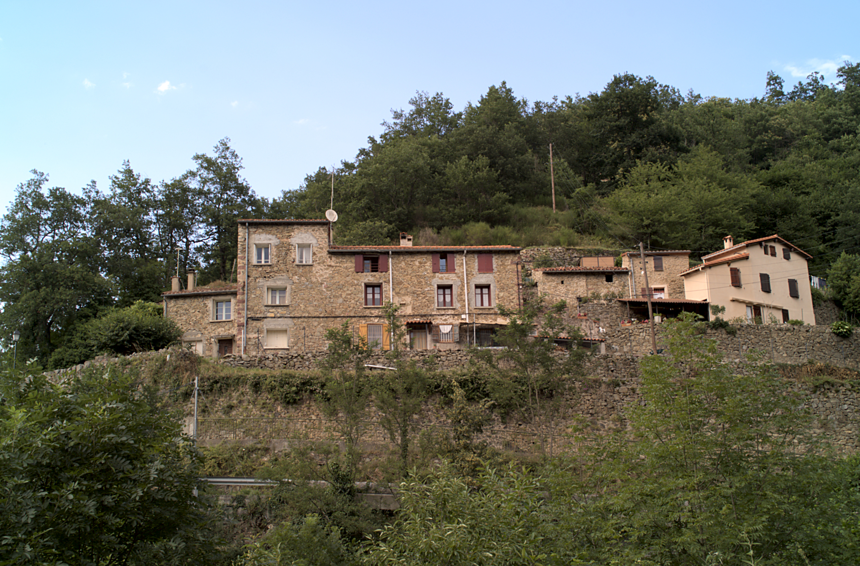 Can Reynet, Rue de la Falaise, Lamanère (Pyrénées-Orientales, Languedoc-Roussillon, France)